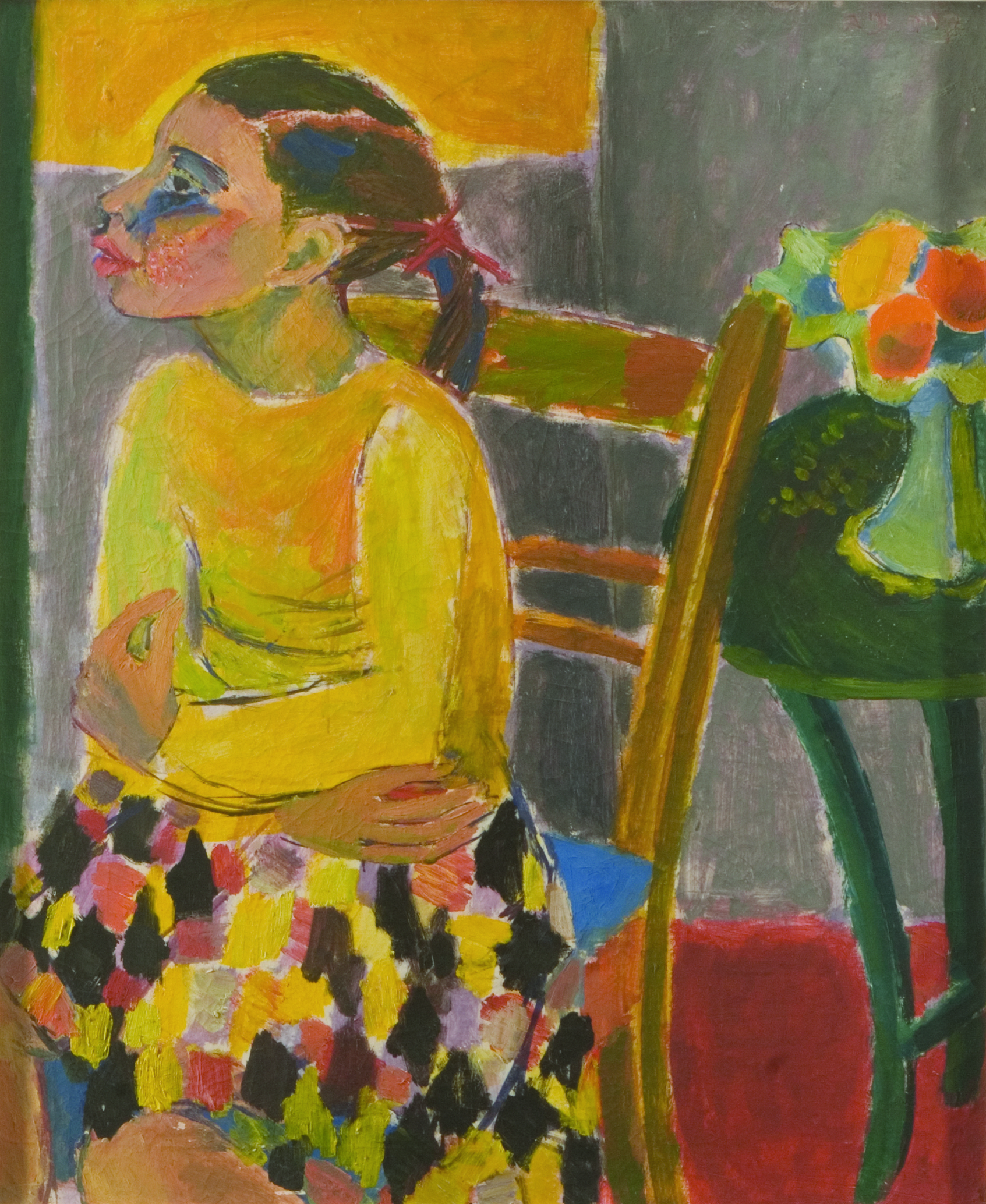 הנערה ענת קון יושבת על כיסא